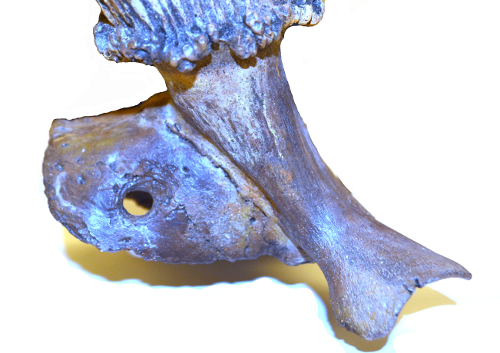 Detailed side view of the RGZM copy of Bedburg-Königshoven antler frontlet 1